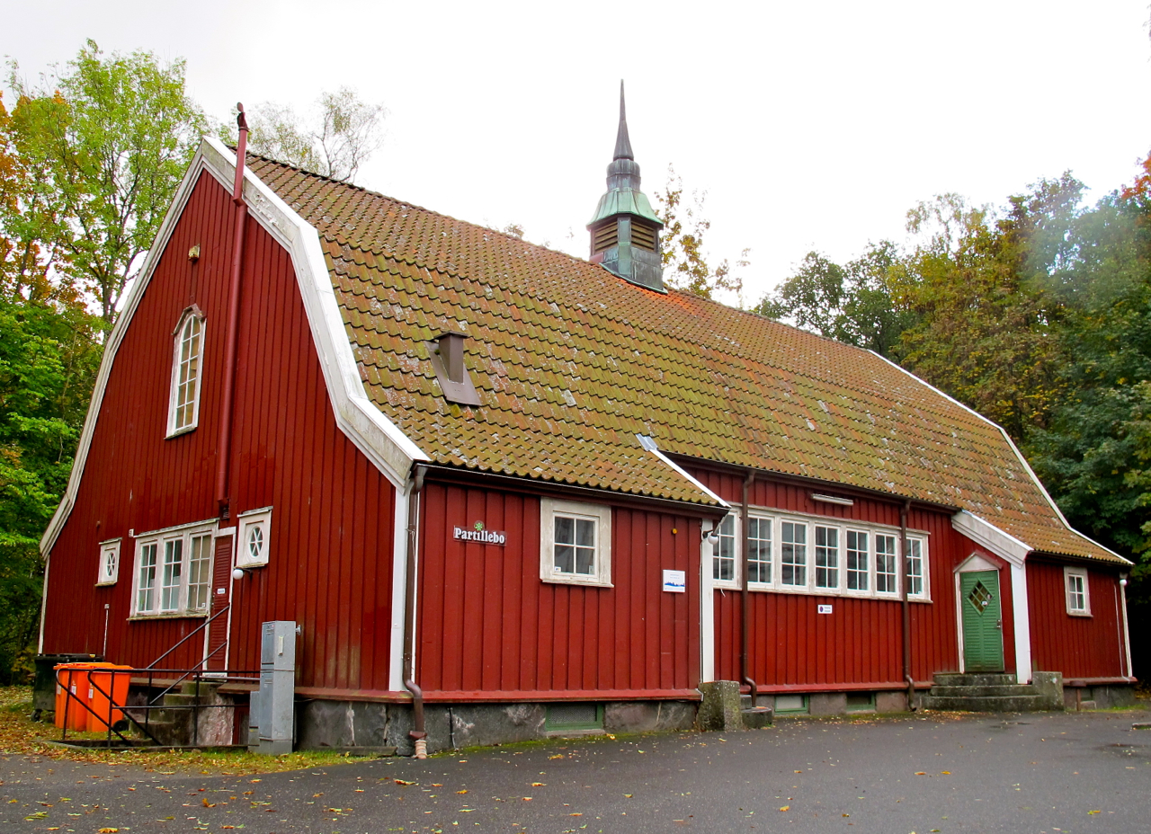 Biografen Göta Bio i Jonsered utanför Göteborg. Tidigare Ordenshuset (uppfört 1914) för Godtemplarlogen i Jonsered.